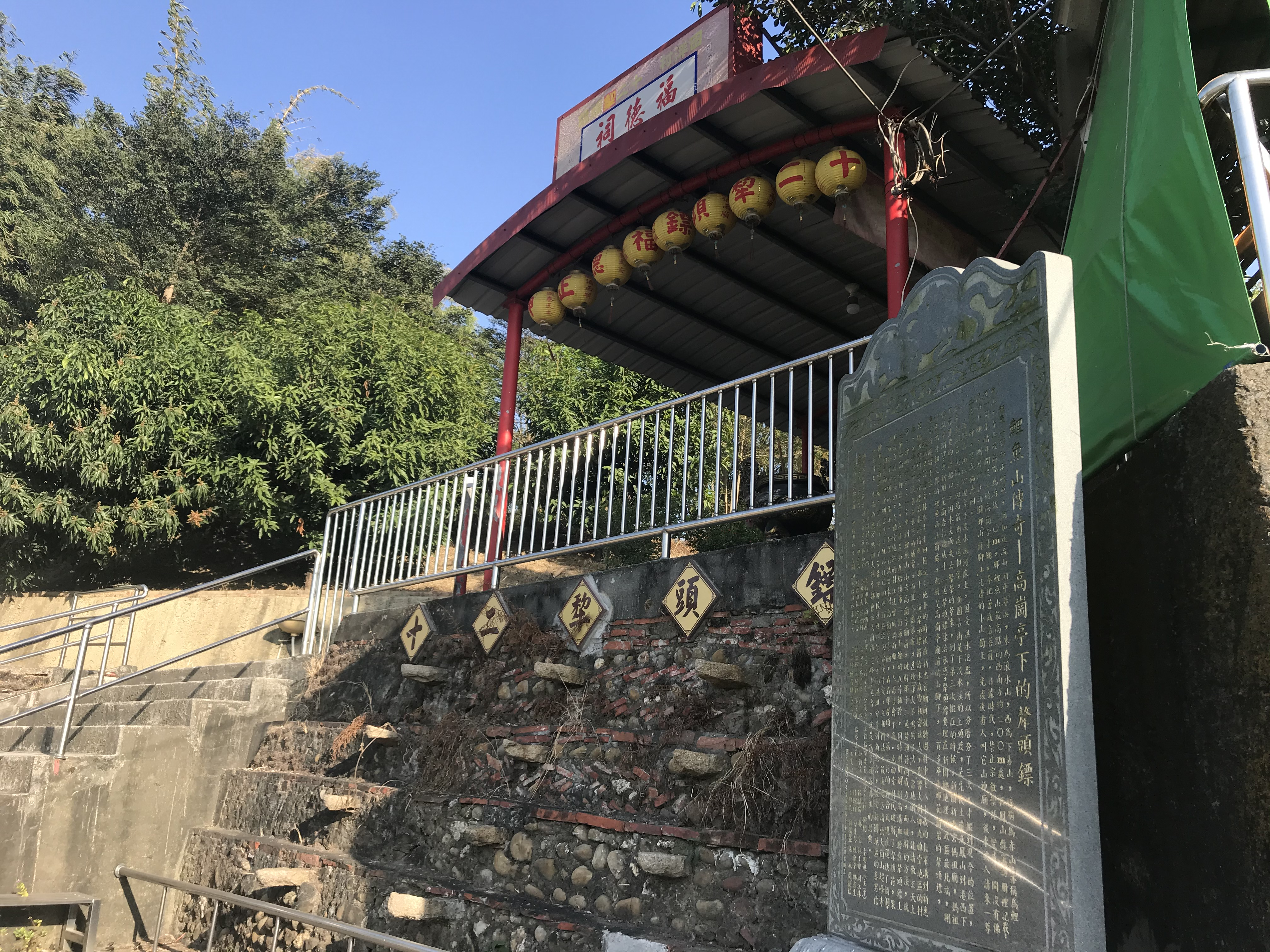 十二犁頭鏢福德祠